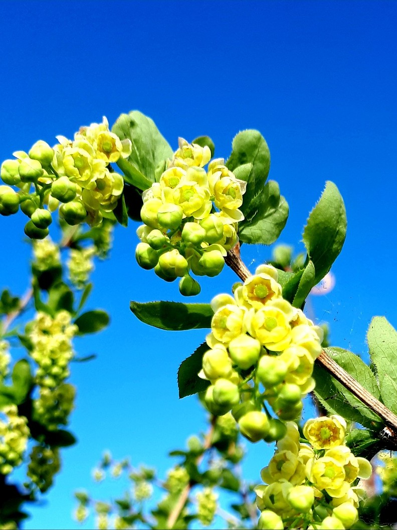 Barberry blossom in Eastern Siberia